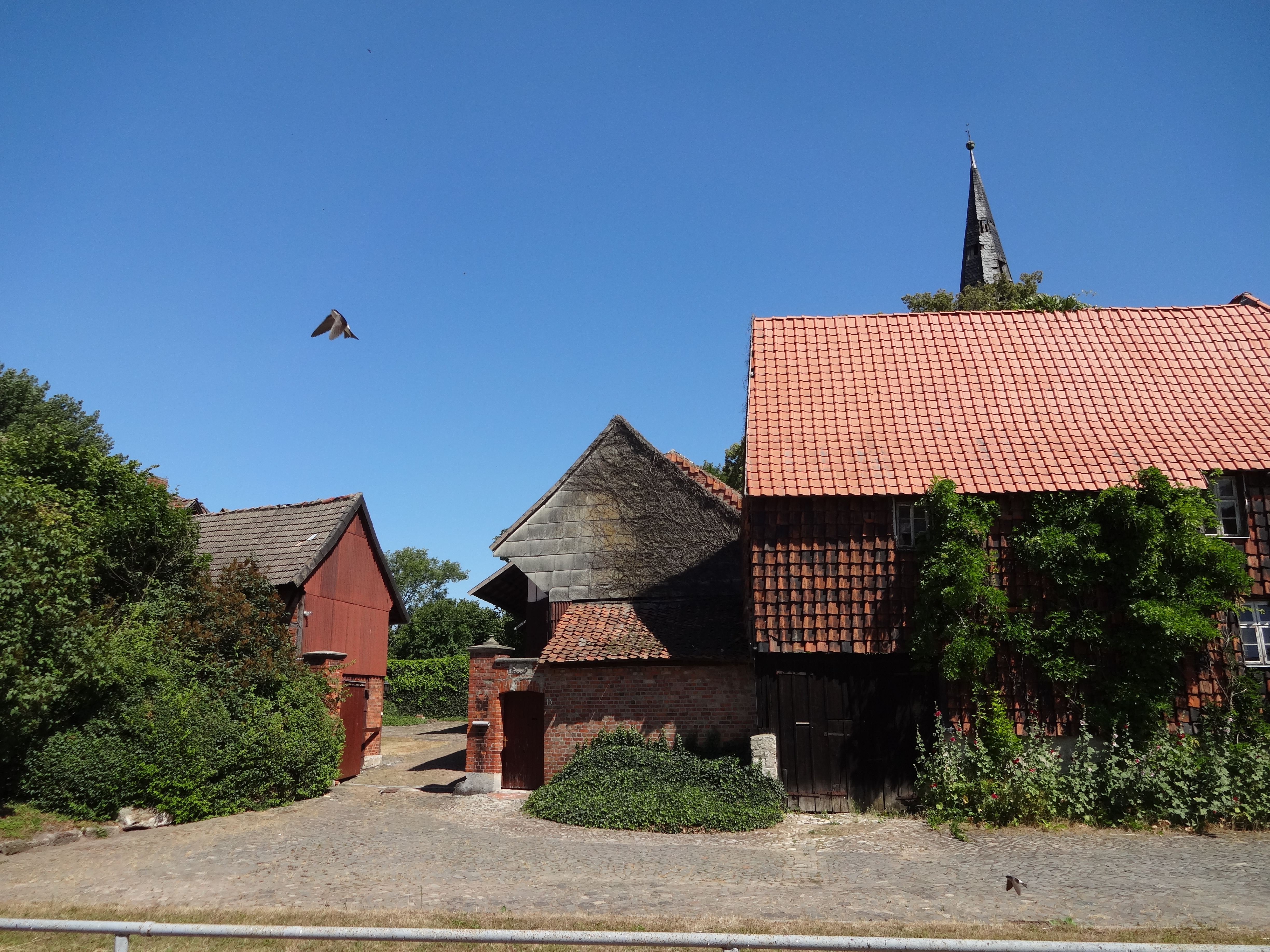 denkmalgeschütztes Bauernhaus in der Straße Am Bache 13 in Dedeleben